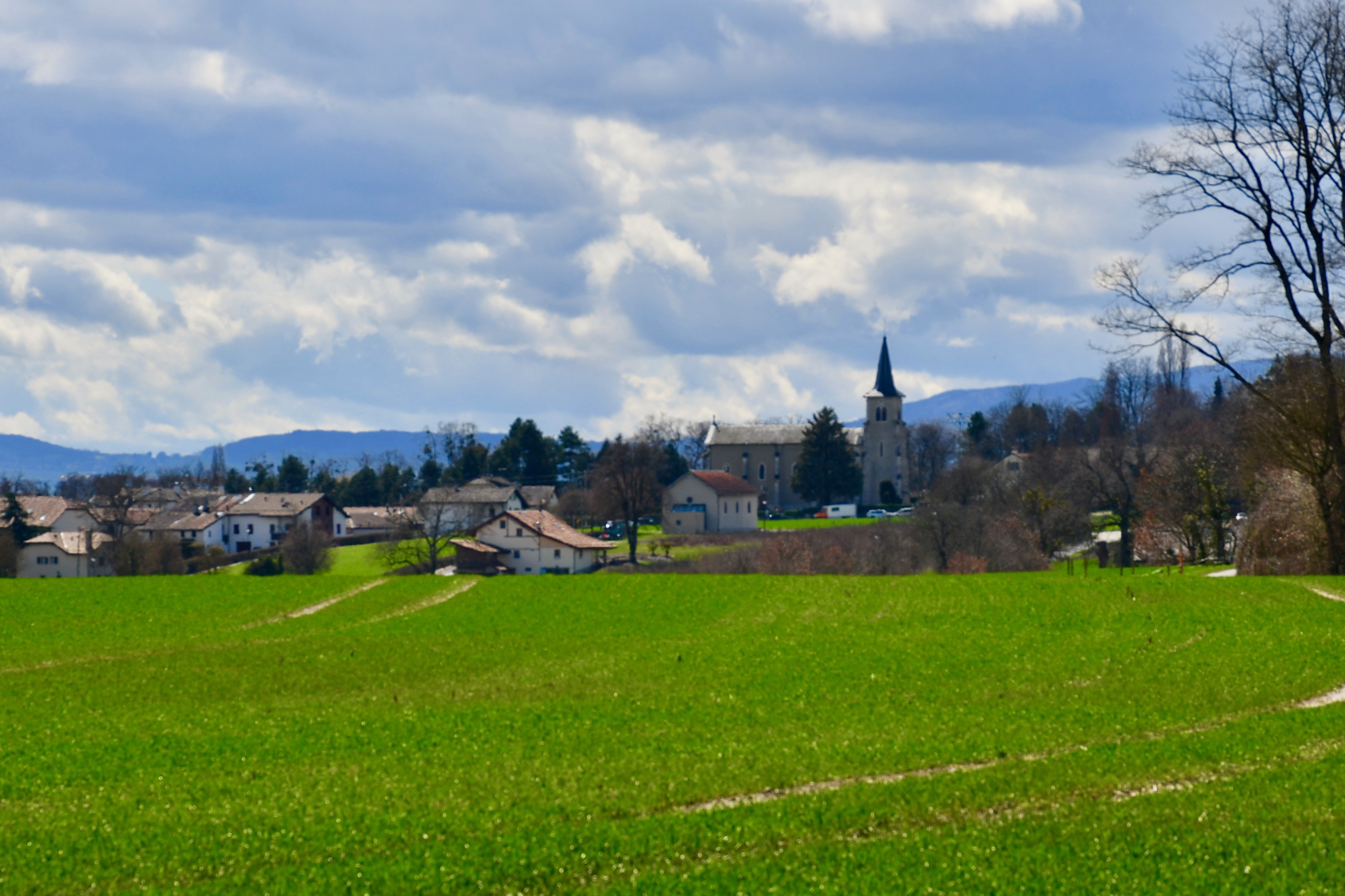 Le village de Collex dans la commune genevoise de Collex-Bossy.